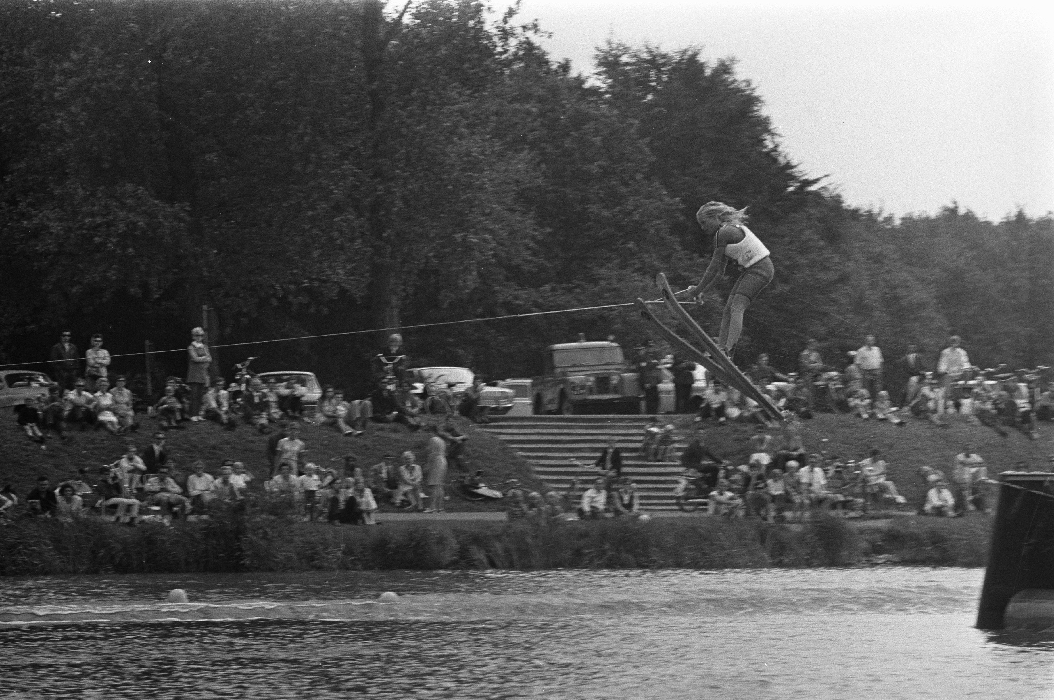 Nationale kampioenschappen Waterski op de Bosbaan in Amsterdam. Willy Stahle in actie.20 juli 1969